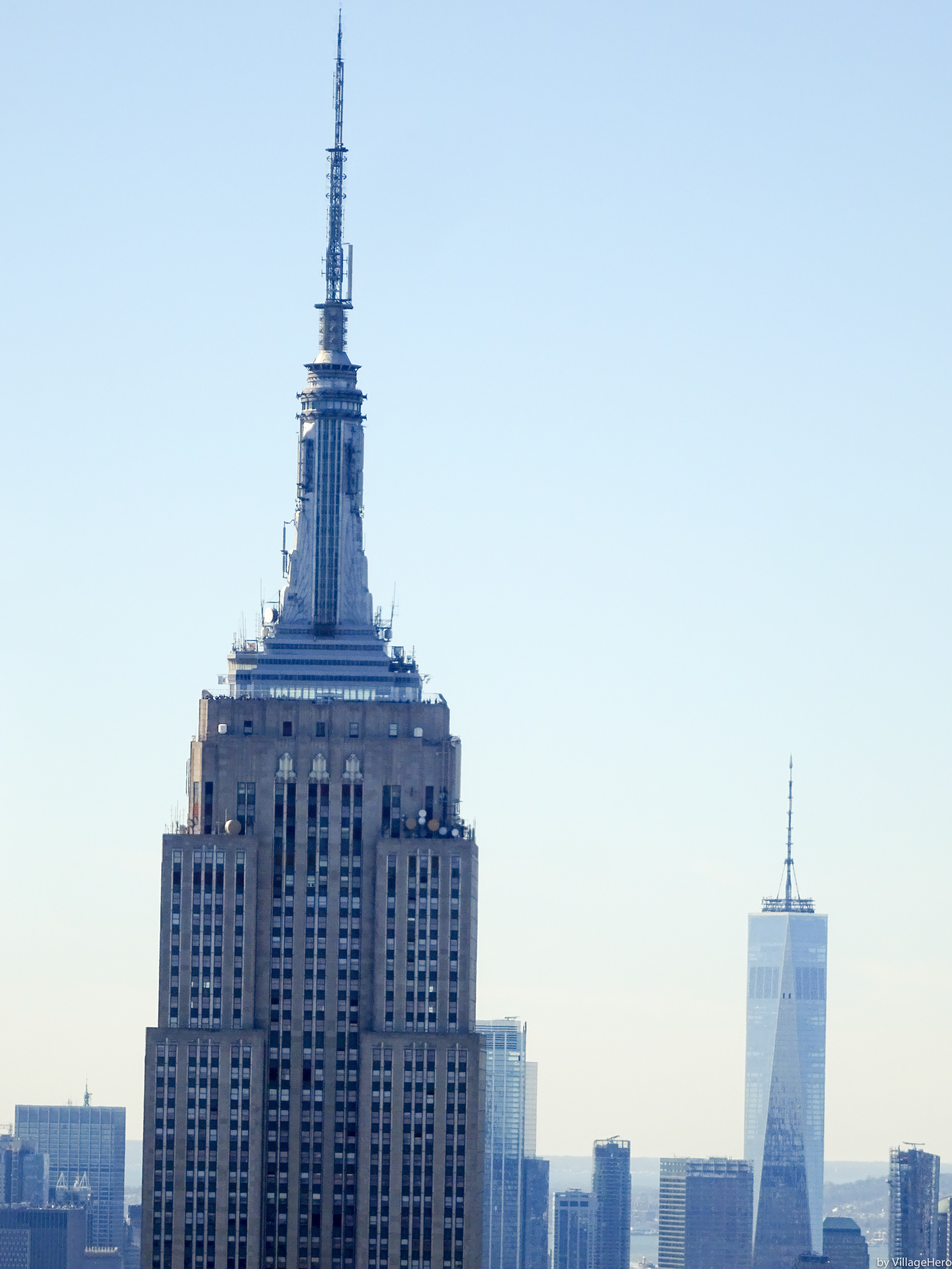 by